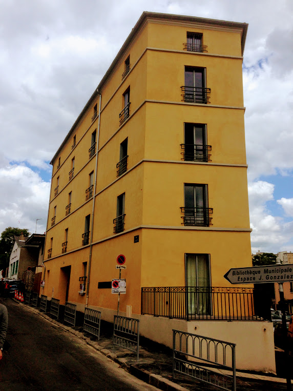 Erik Satie house in Arcueil